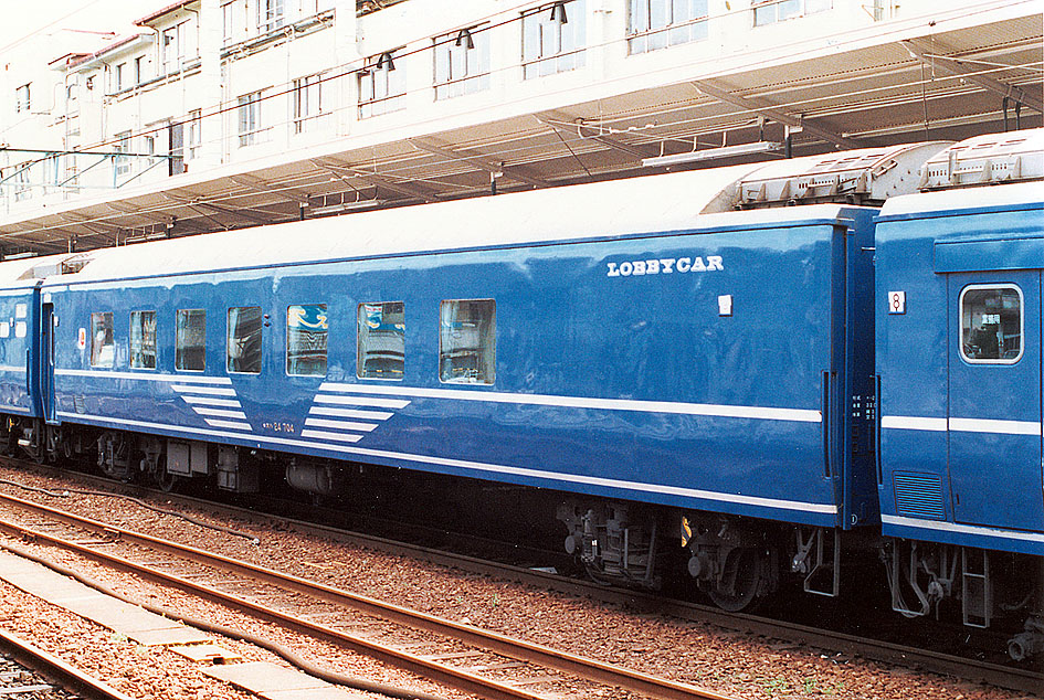 国鉄 オハ24 704「ロビーカー」